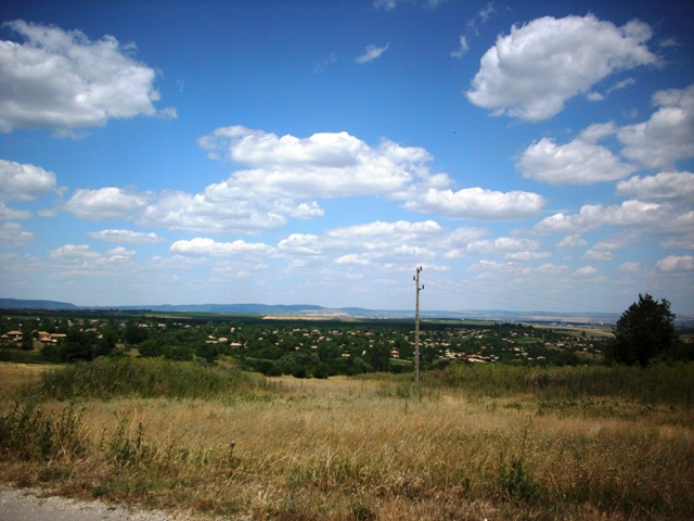 Общ изглед на село Берковски, община Попово (от пътя за село Долец) - юли 2008 год. Фото: Владимир Стойков